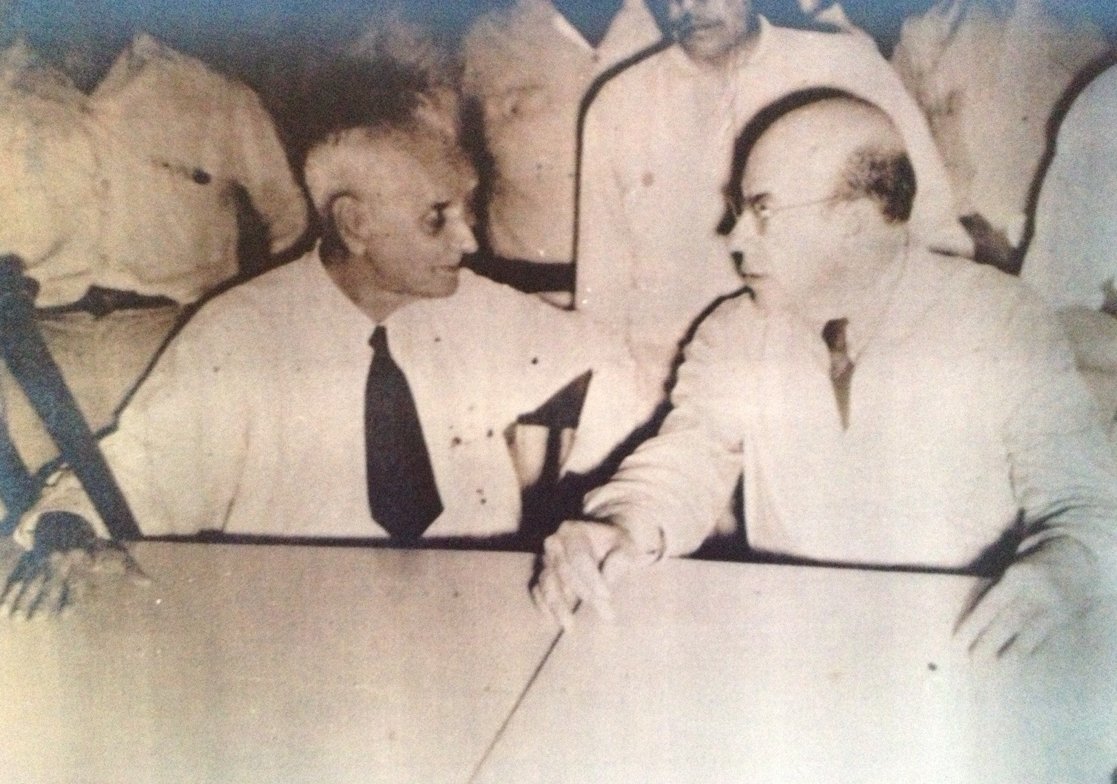 El Profesor Donato Márquez Azuara con el Gobernador del Estado de Veracruz Lic. Angel Carvajal Bernal